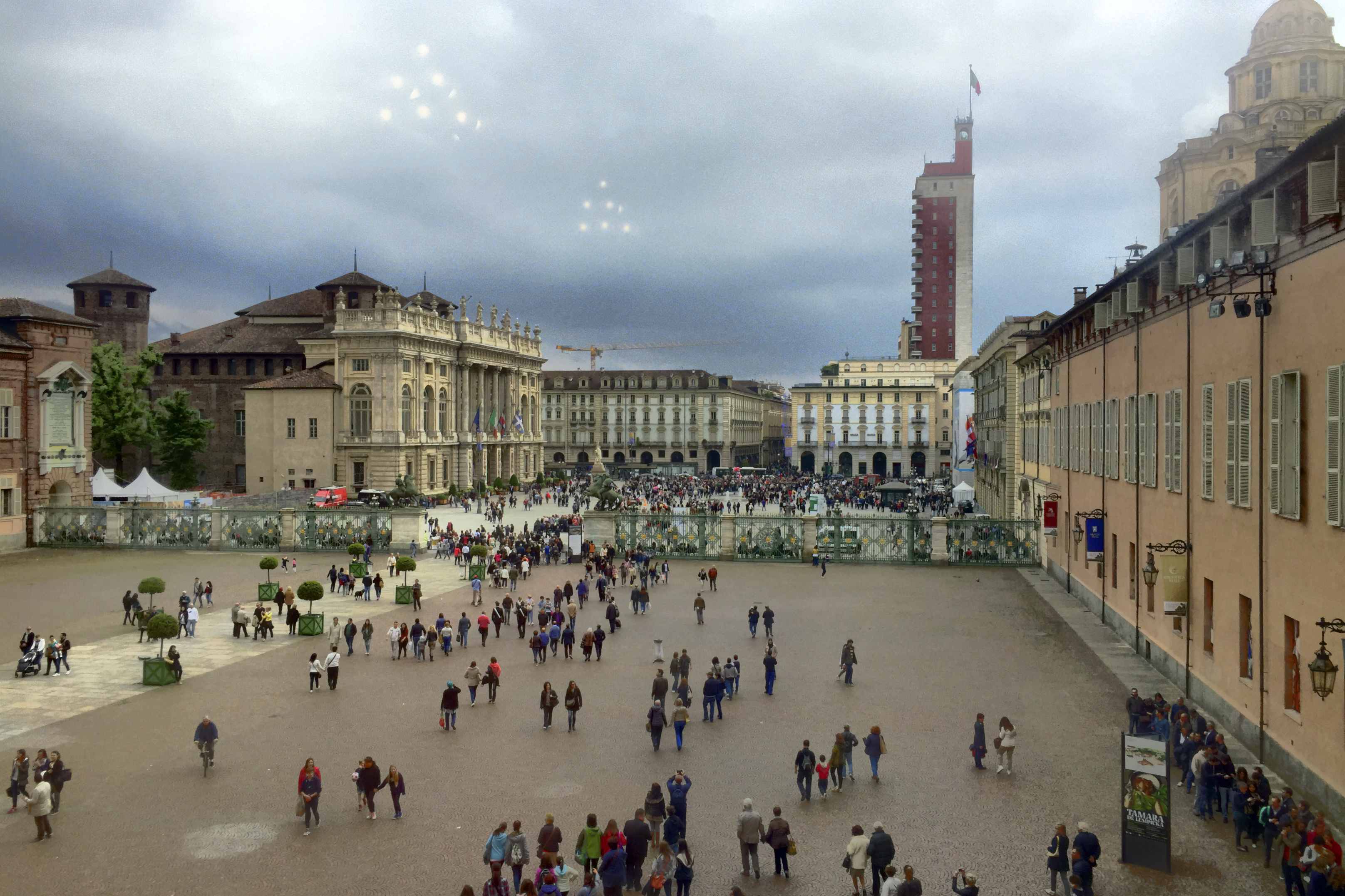 Palazzo Reale Torino